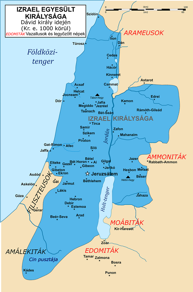 Az egységes ókori Izraeli Királyság